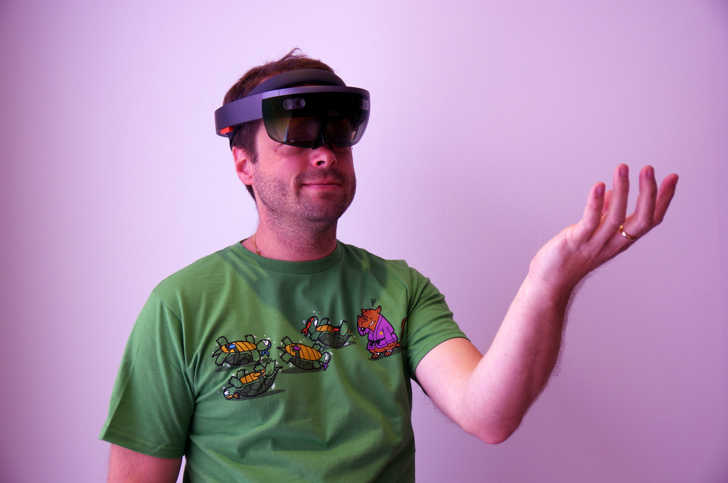 HoloLens, Geste "Blüte" (Bloom). Präsentator: Andreas Erben